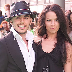 Тимур Родригез с супругой на церемонии вручения премии МУЗ ТВ 2011 3 июня 2011 года